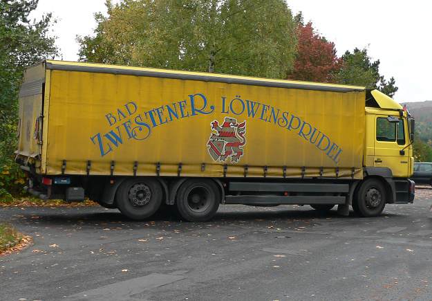 Laster Löwensprudel